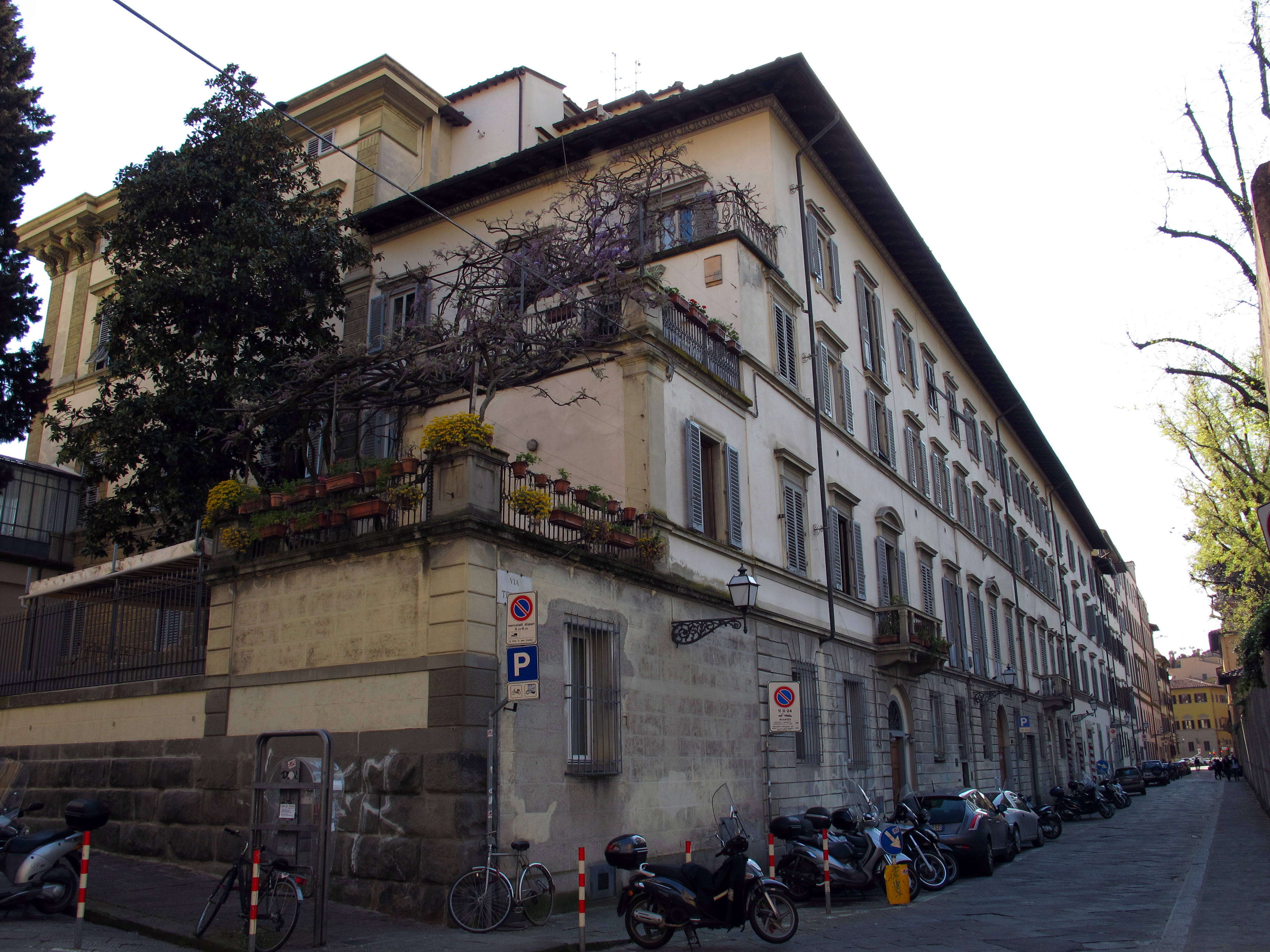 Via tripoli 23-25-27-29, Ex-ospedale dei Santi Filippo e Jacopo